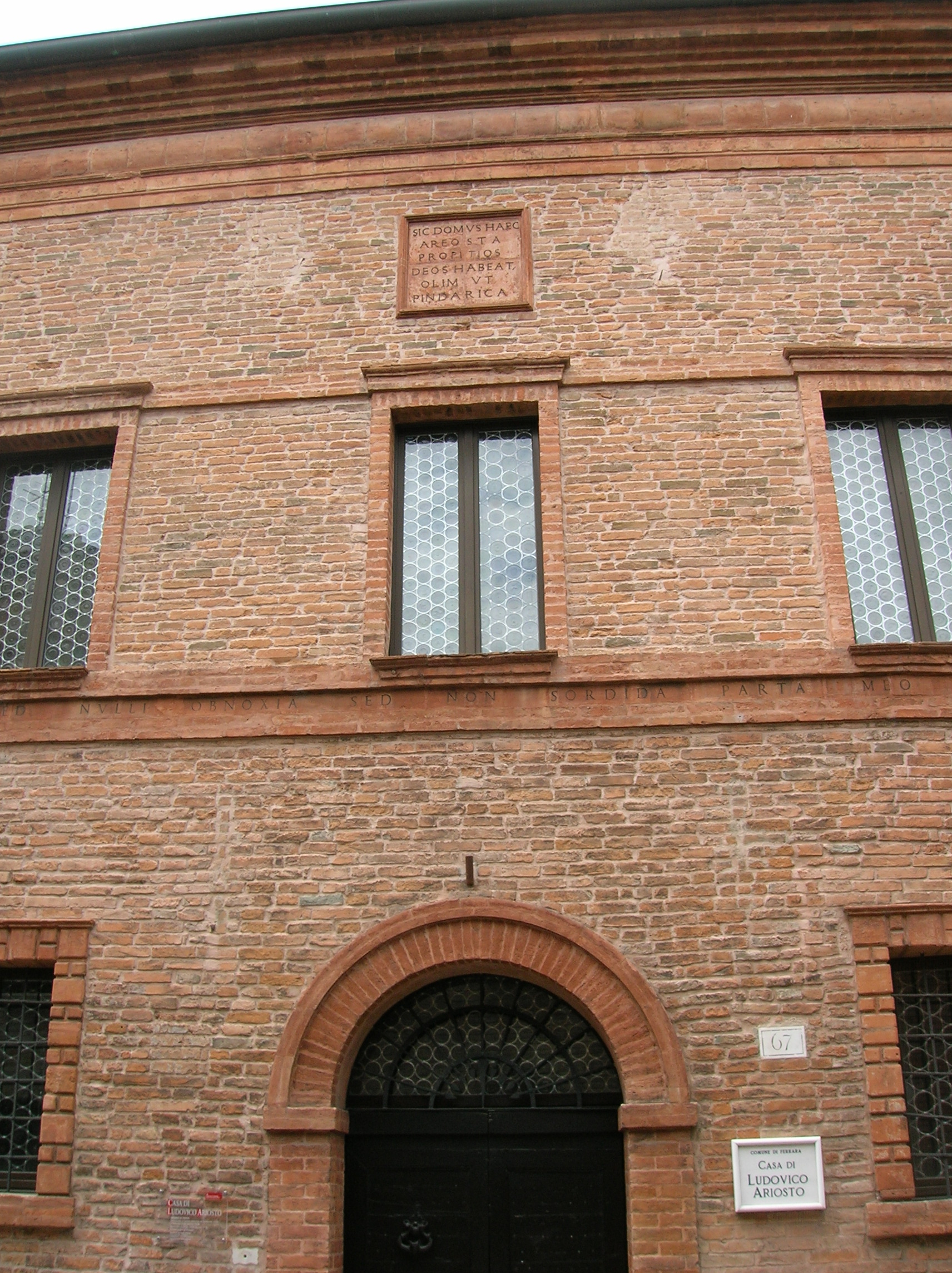 Casa di Ludovico Ariosto a Ferrara.